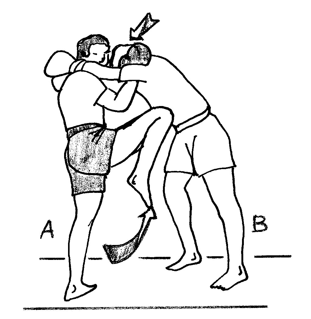 genou_remontant3.jpg